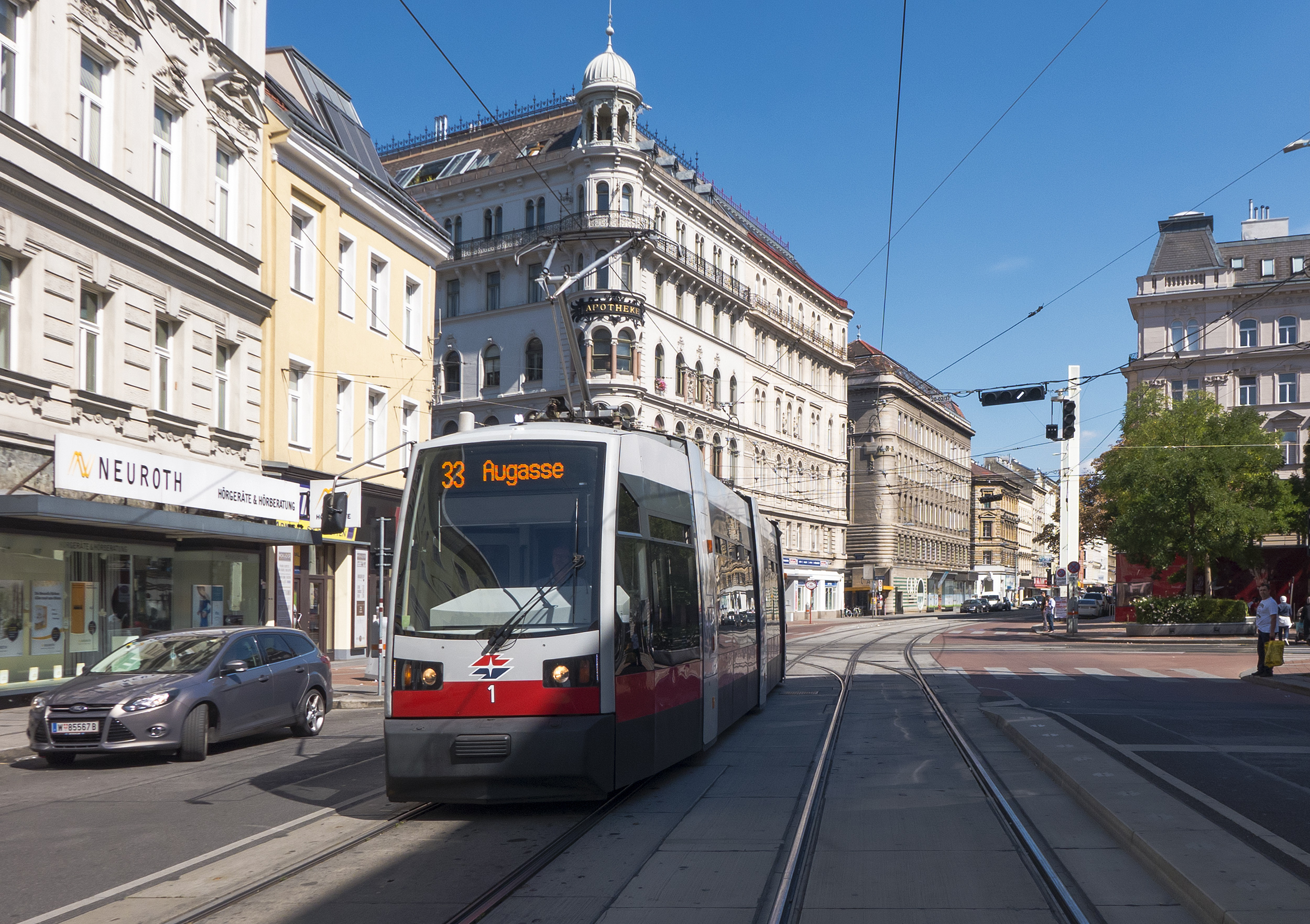 Wallensteinstraße in Wien 20 beim Wallensteinplatz Richtung Nordosten, ULF Nr.1